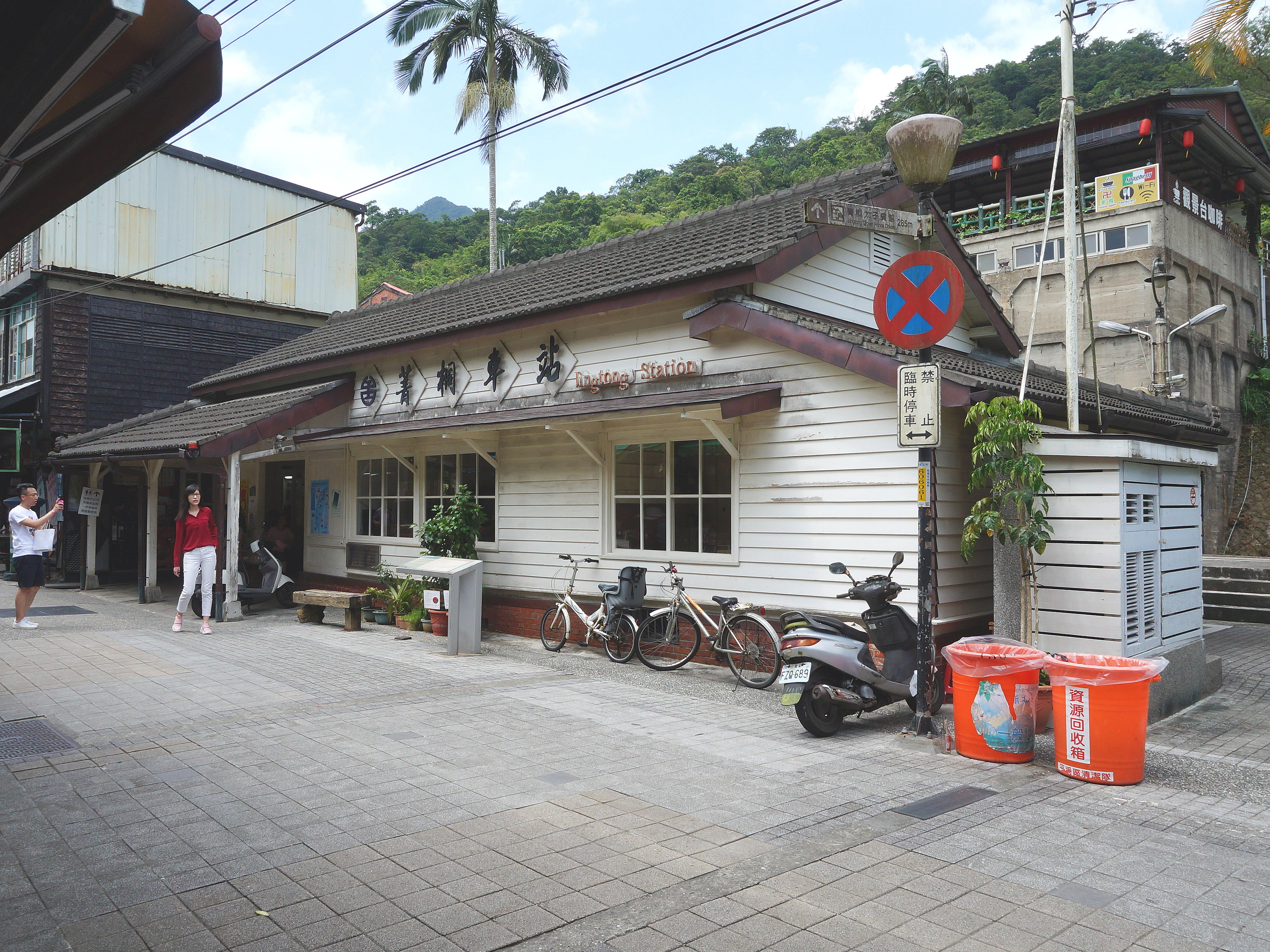 臺灣鐵路管理局菁桐車站。